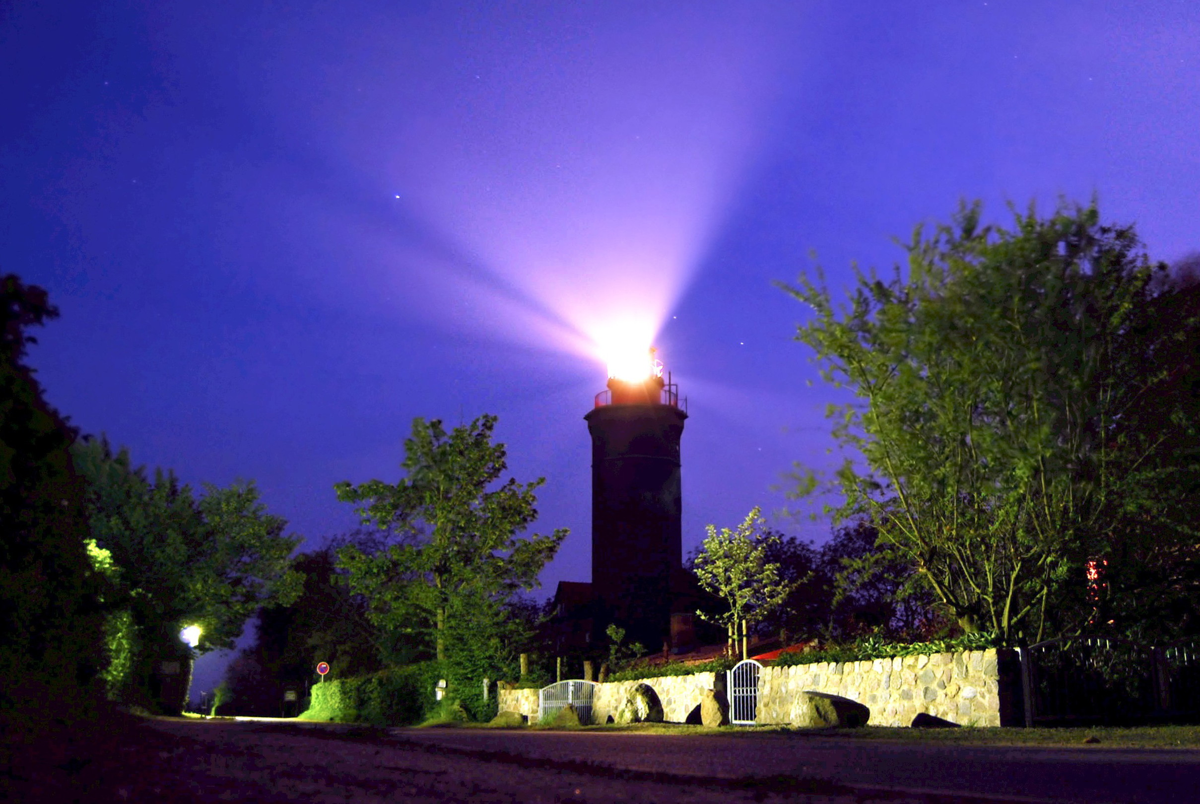 Leuchtturm Dahmeshöved, Dahme in Holstein; Nachtaufnahme